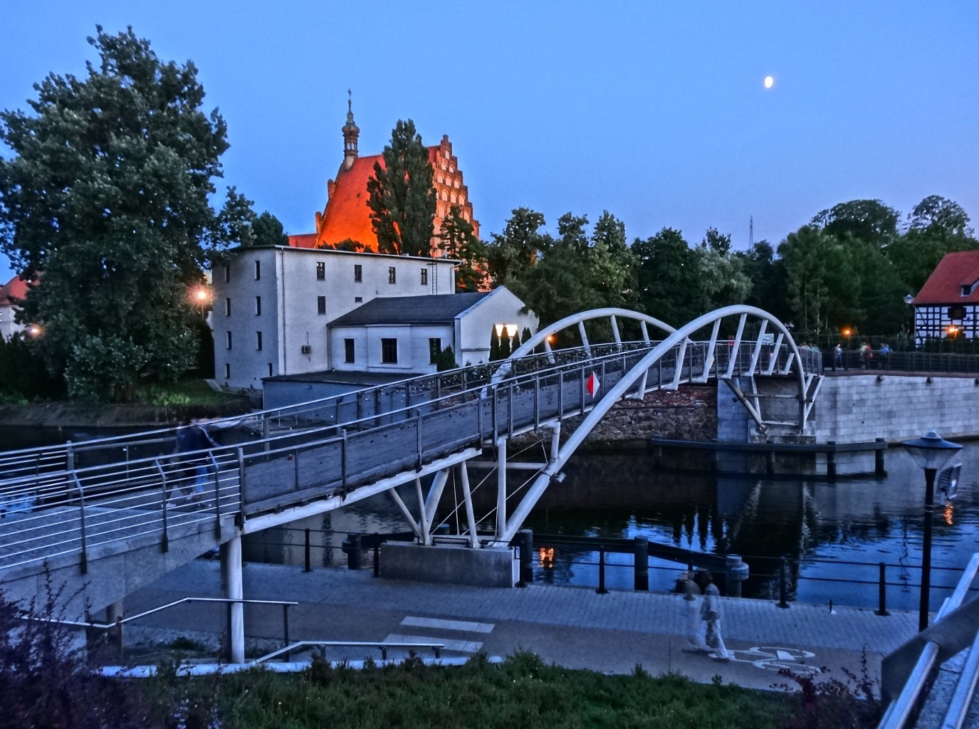 Kładka dla pieszych łącząca Wyspę Młyńską z Operą Nova i bulwarami nad Brdą